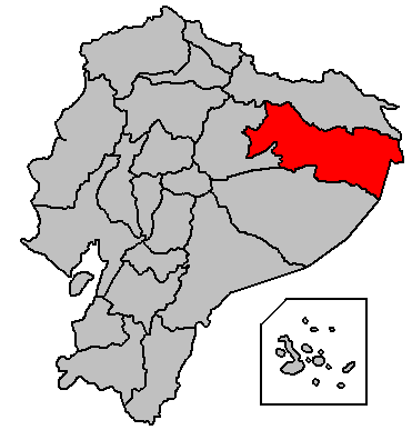 Ubicación en la República del Ecuador.